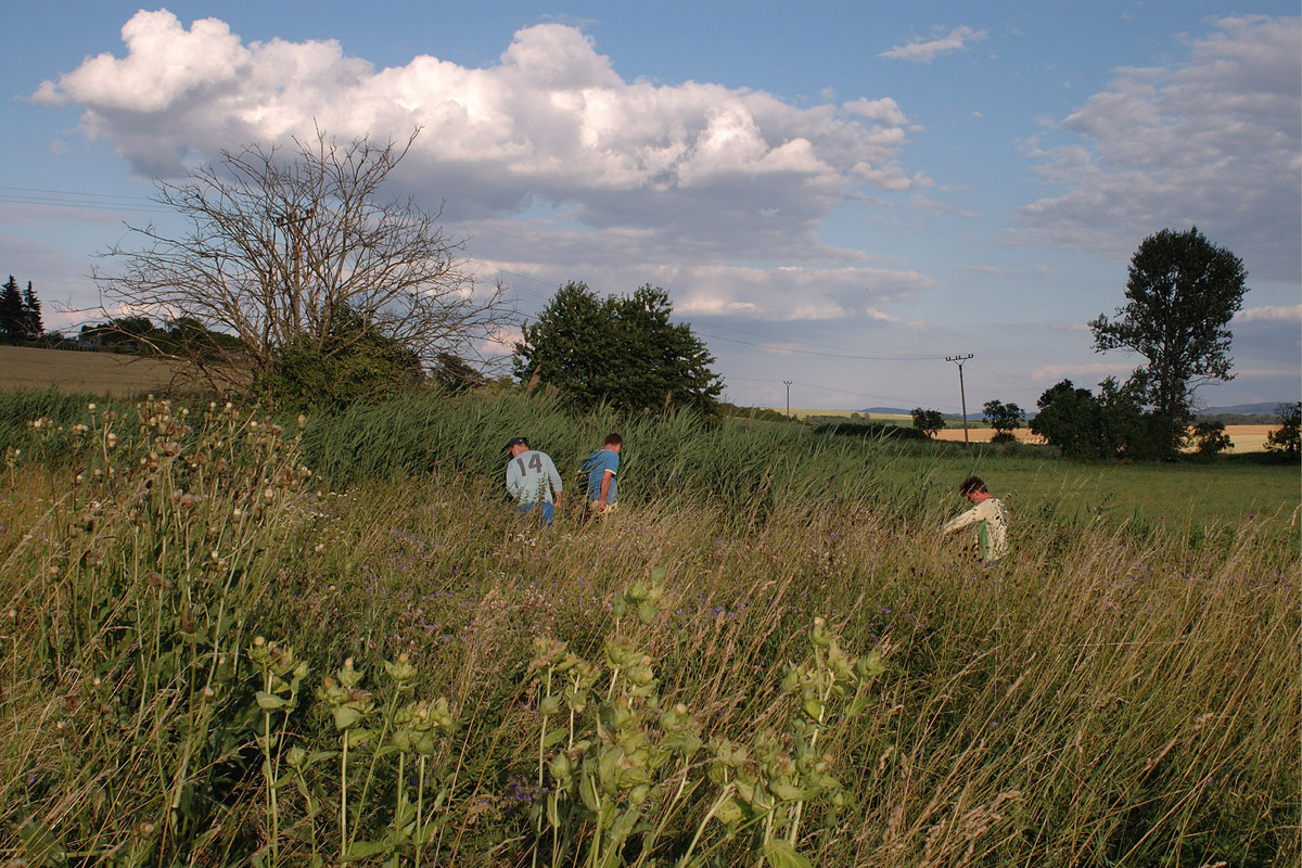 Tomáš Pospěch´s photography